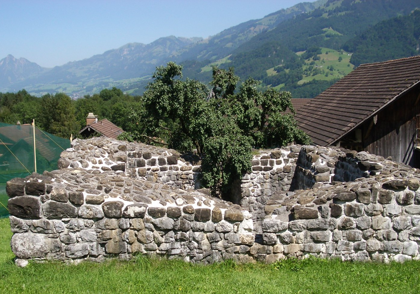 Giswil OW, Switzerland